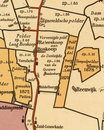 Verenigde_polder_aan_de_Oostzijde_van_de_Gouwe